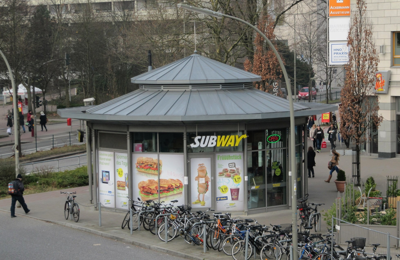 Subway-Filiale am Poppenbüttler Bahnhof, Hamburg